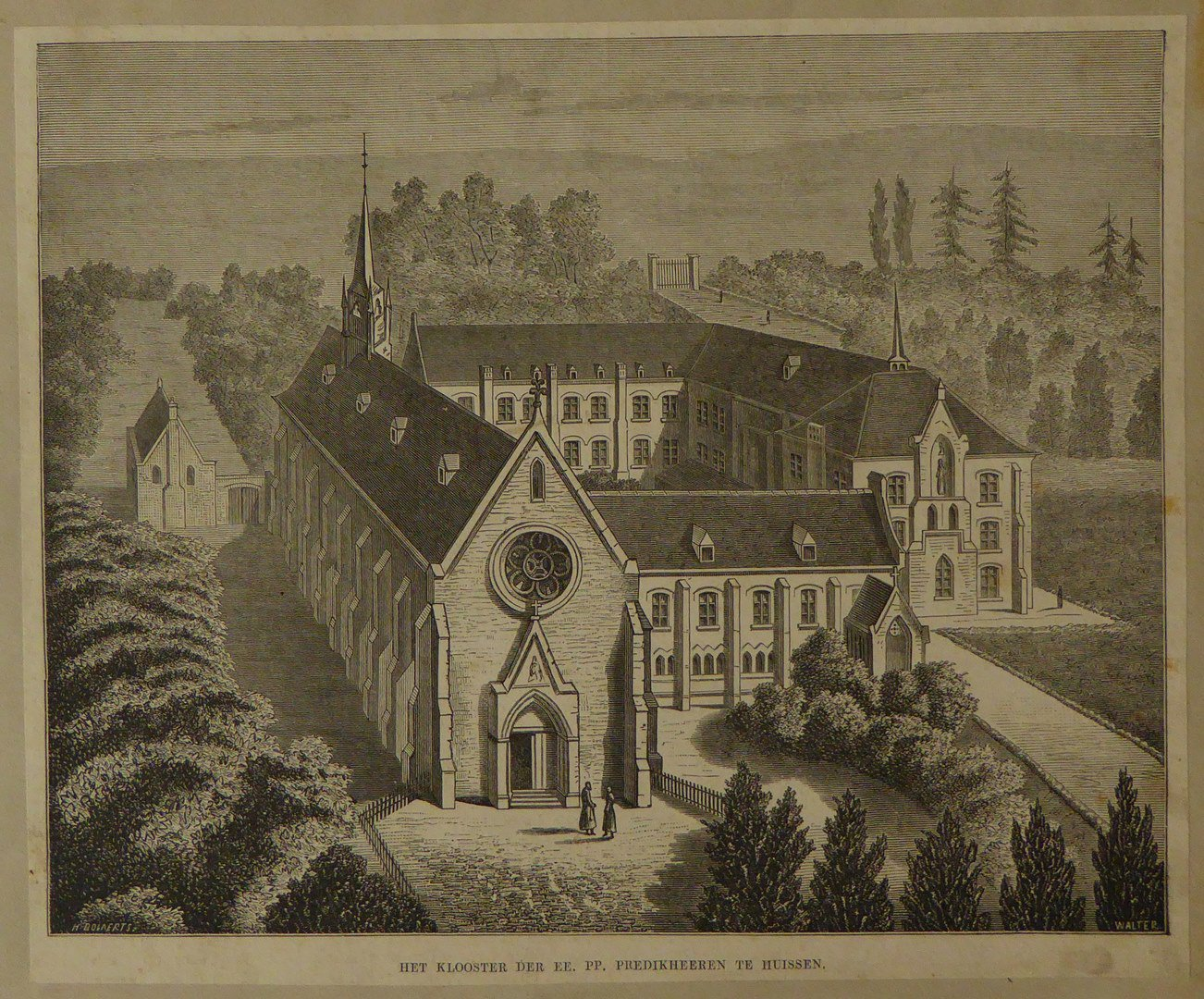 Klooster predikheeren Huissen, gravure J. Walter (coll. Catharijne Convent)